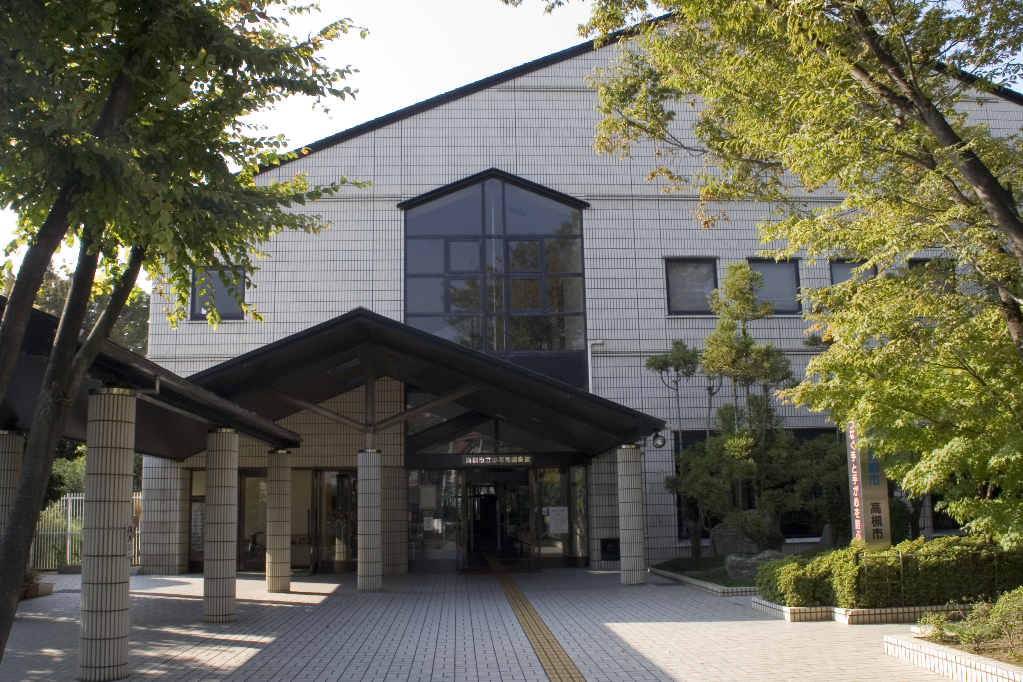 高槻市立小寺池図書館